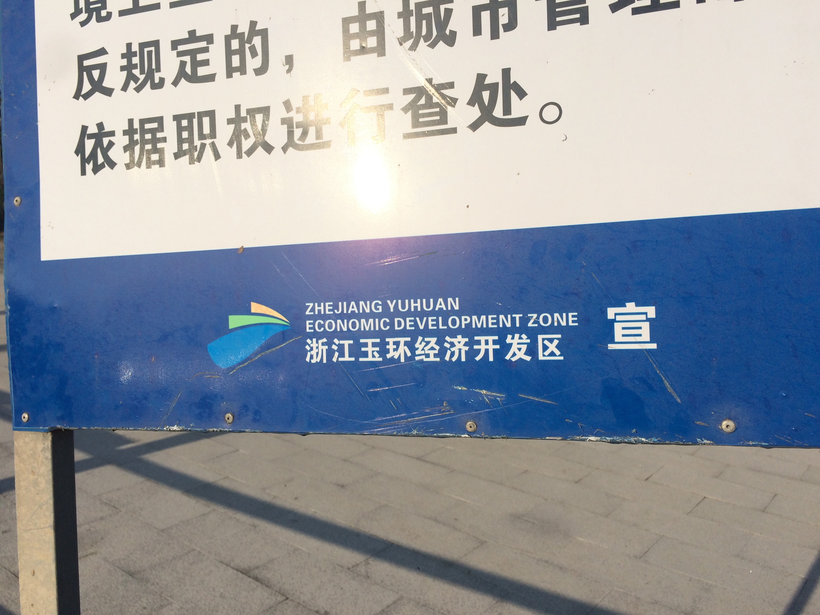 中文（中国大陆）: 浙江玉环经济开发区Logo